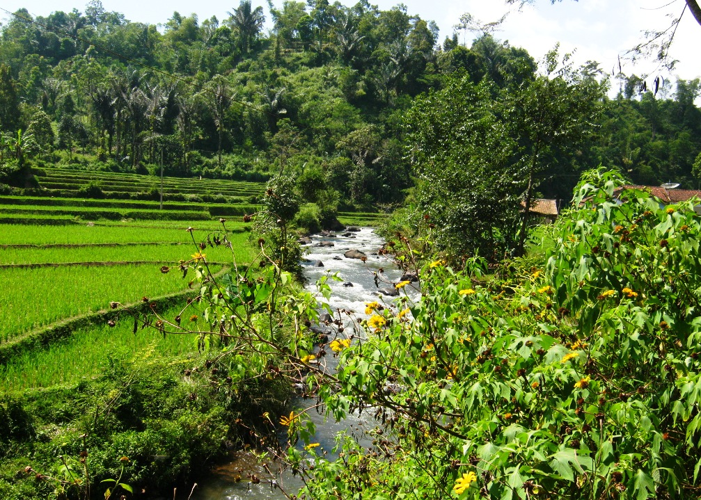 Citalem, Cipongkor, West Bandung Regency, West Java, Indonesia